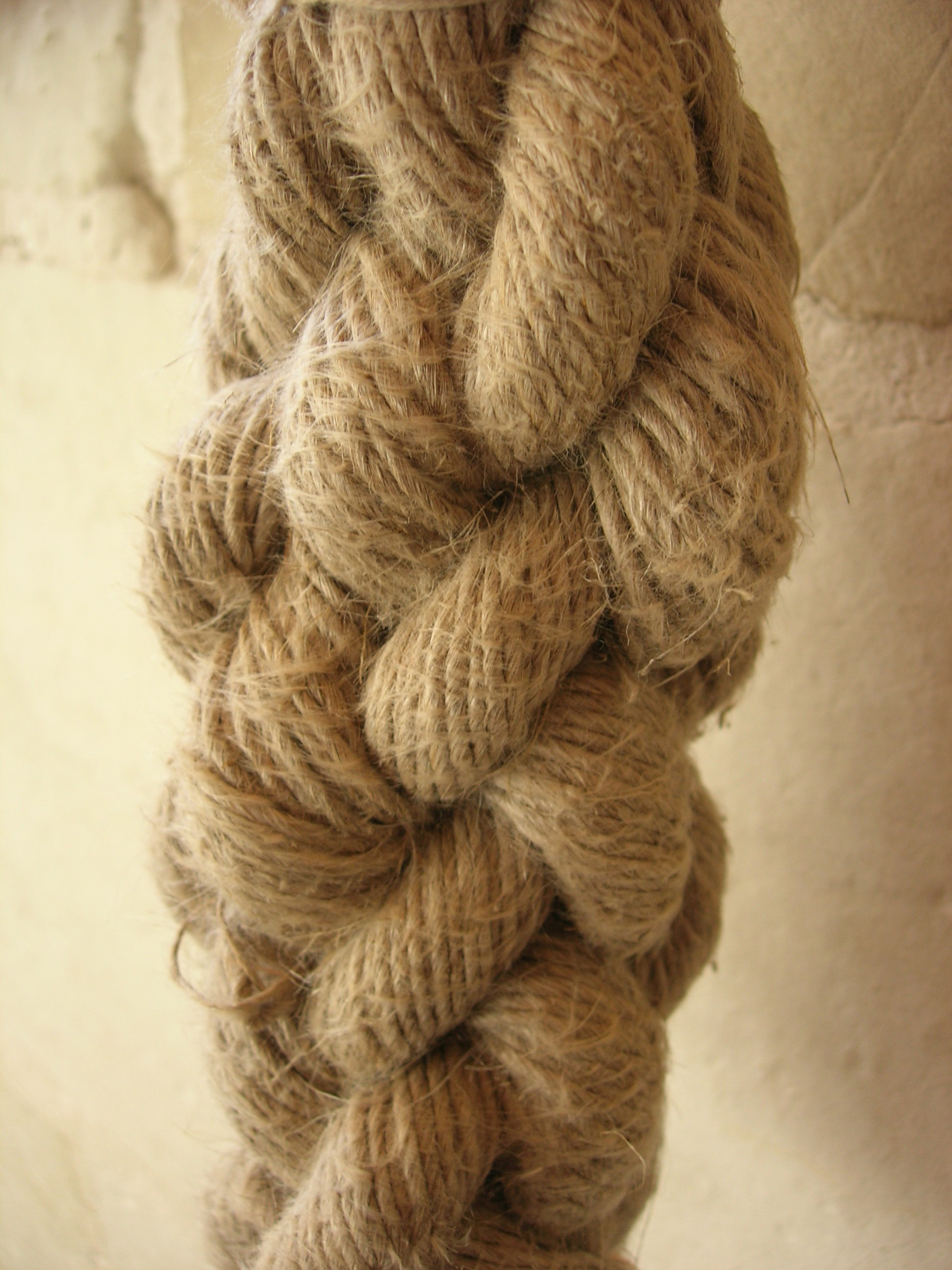 Corde tressée. Auteur: Vassil.